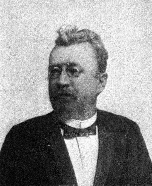 Österreichischer Politiker, Reichsratswahl 1907, Name siehe Dateiname